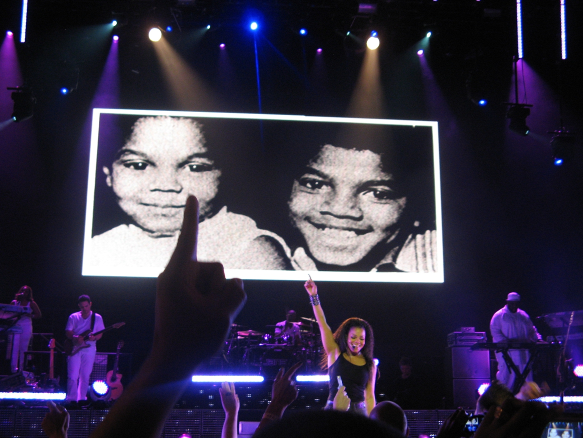 113 - Janet Jackson - Royal Albert Hall 2-7-2011